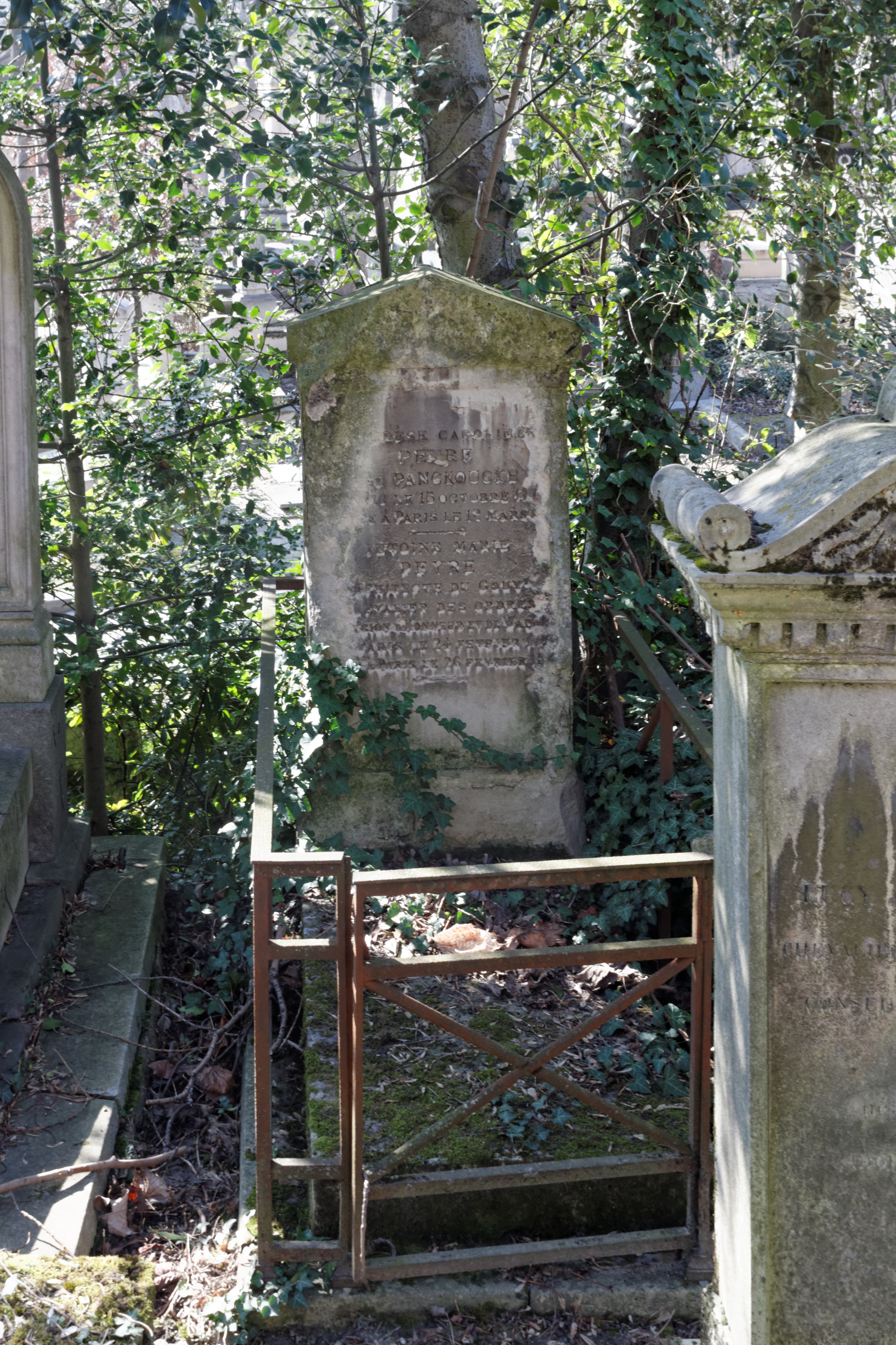 Sépulture d'Antoine-Marie Peyre (1770-1843), architecte ; Thérèse-Caroline Panckoucke (1775-1838).